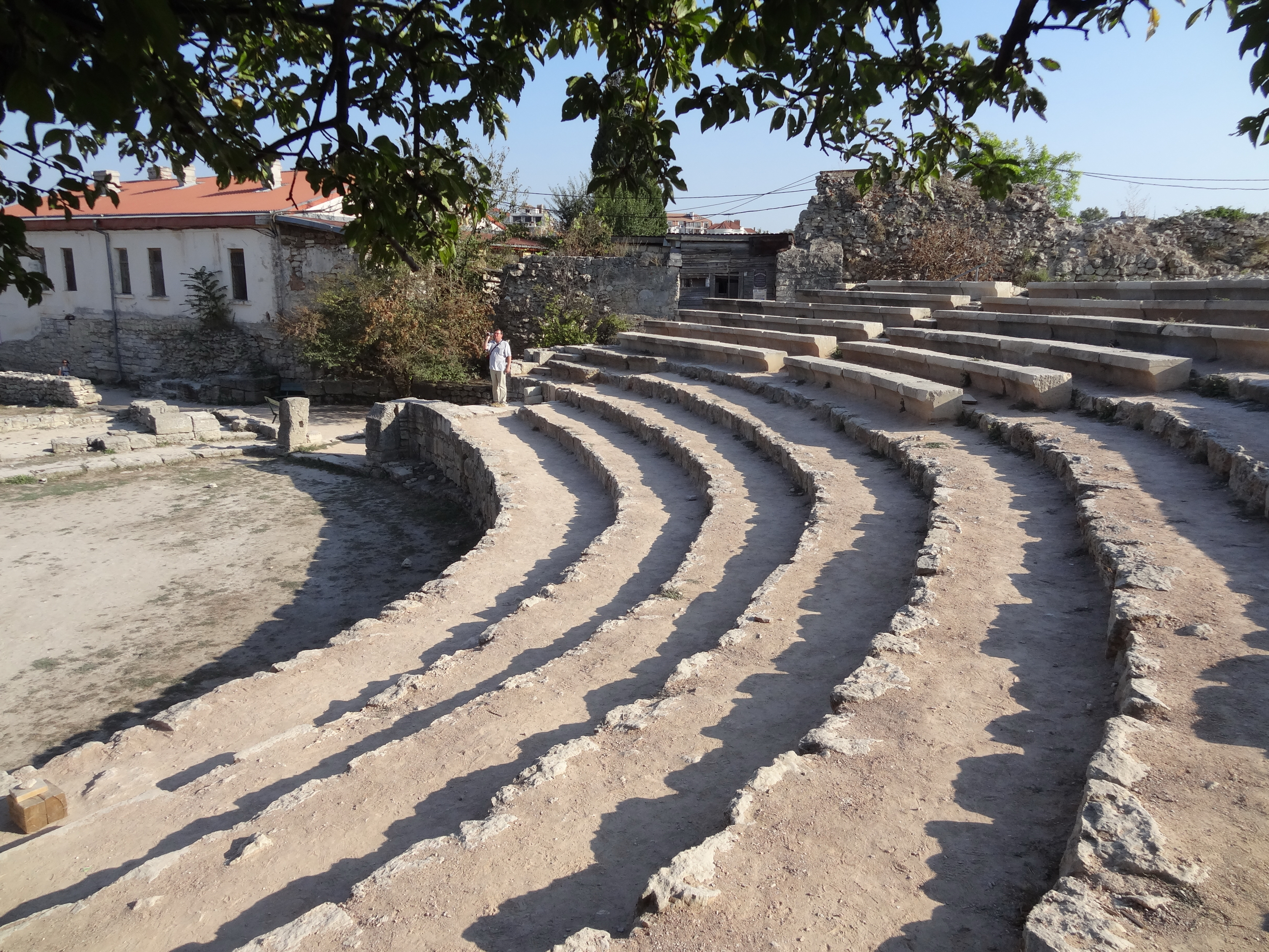 Античный амфитеатр (Херсонес): Гагаринский район, Севастополь This object is located on the Crimean Peninsula and recognized as cultural heritage by both Russia and Ukraine under the monument ID: 9230057047/ 85-364-0247, respectively. The legal status of the Crimean region is currently disputed.